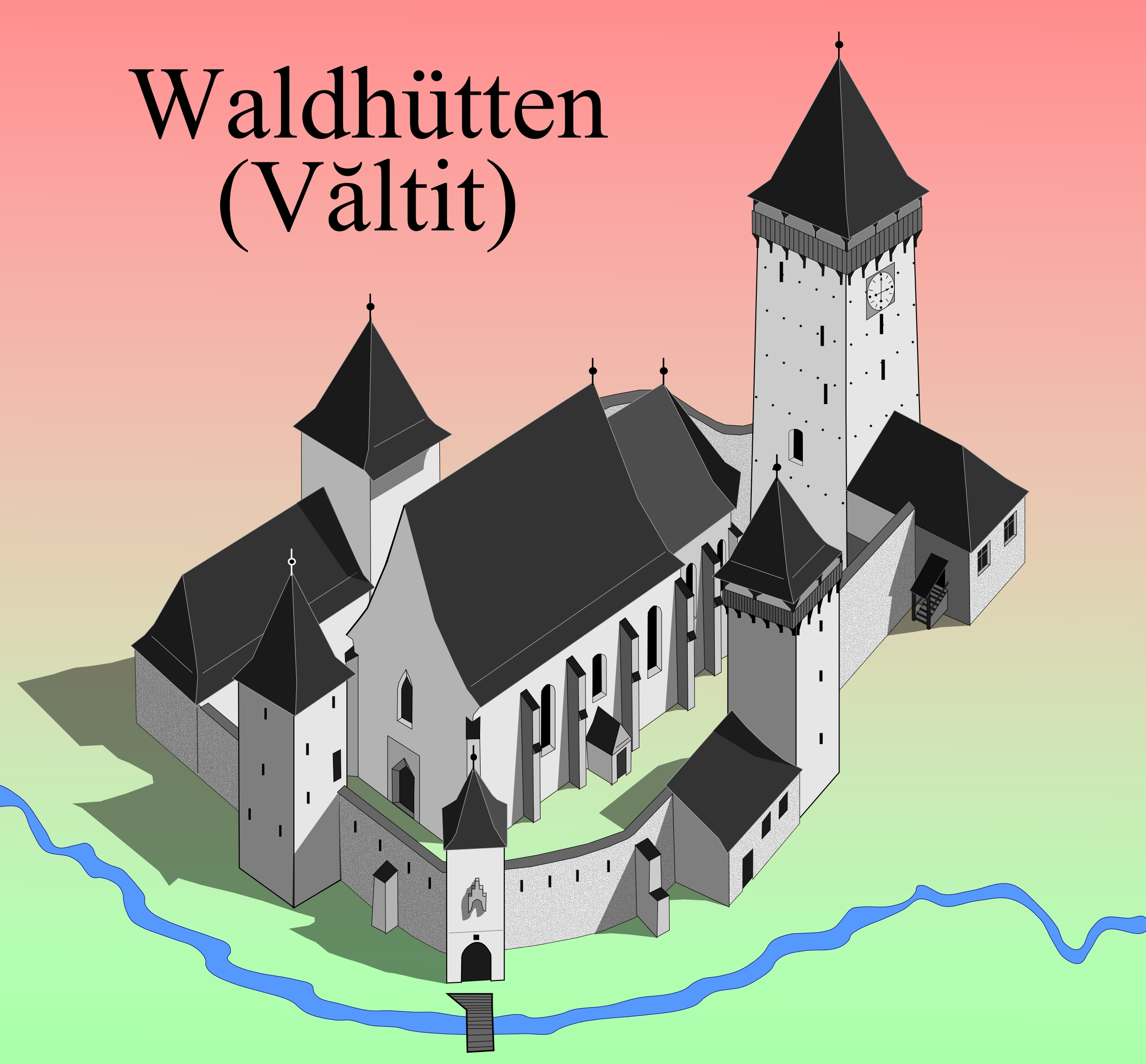 Biserica fortificata din Valchid.